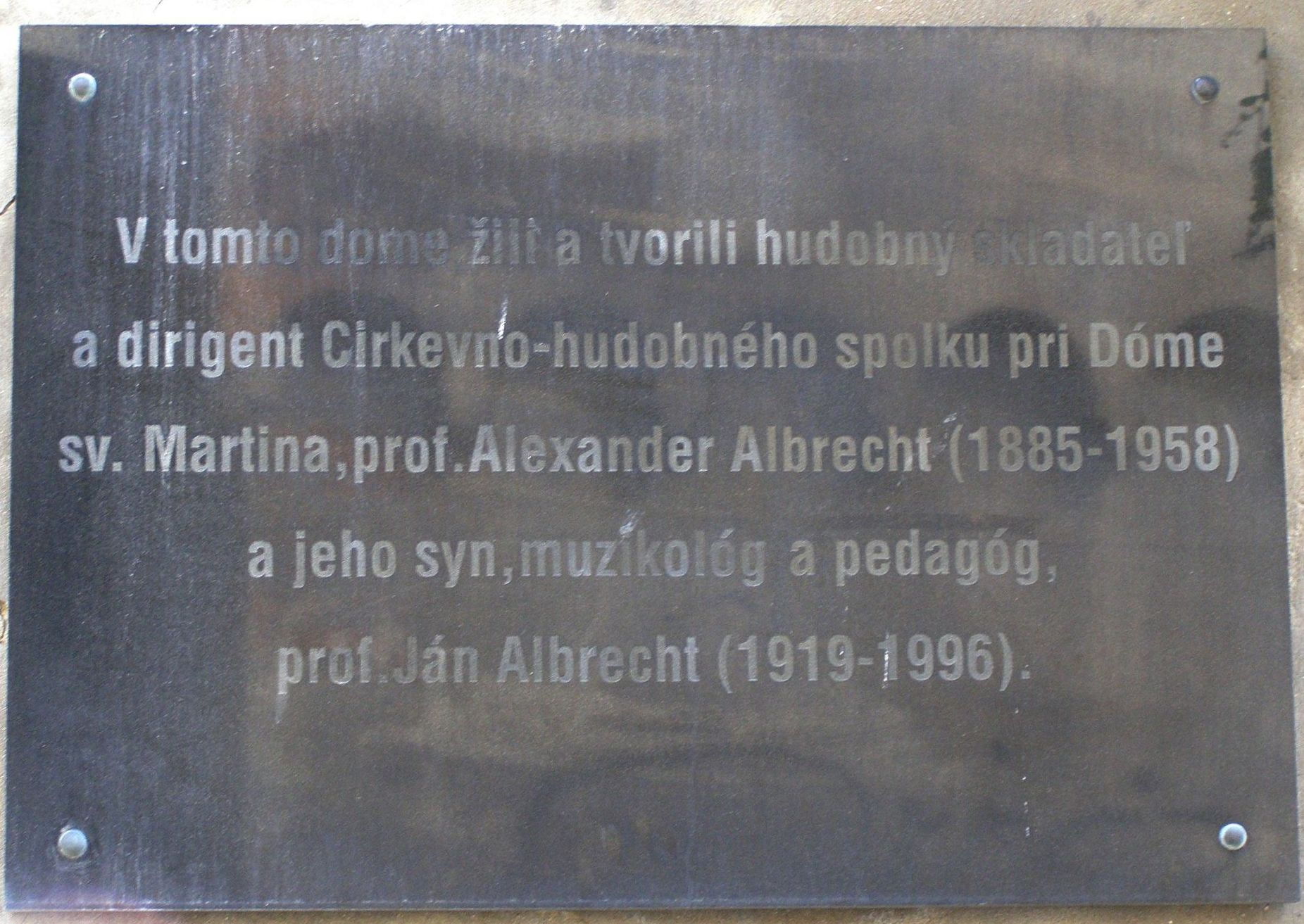 Pamätná tabuľa otca a syna Albrechtovcov na budove na Kapitulskej ul. č. 1.